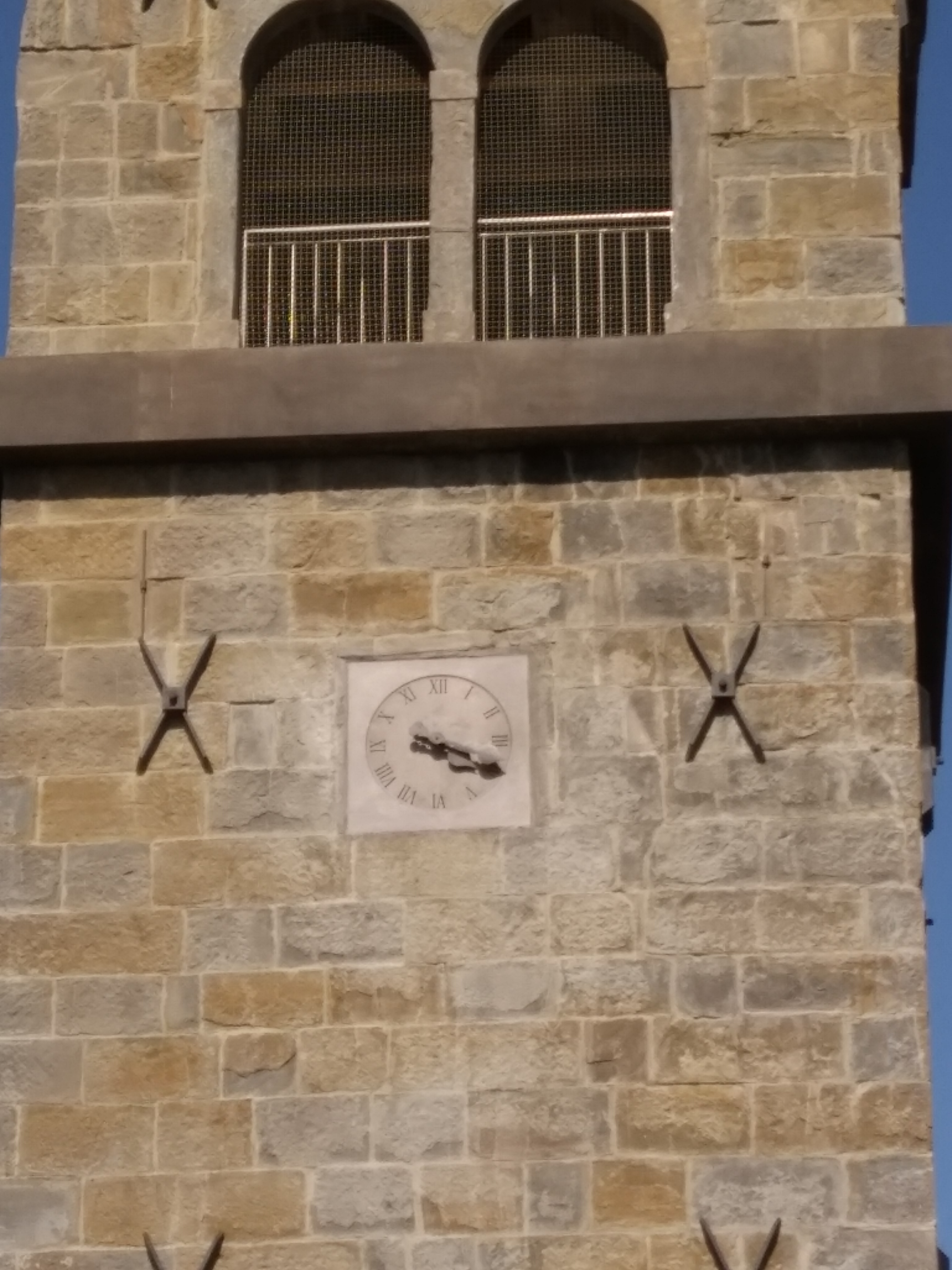 Zunanja številčnica na zvoniku v Marezigah.